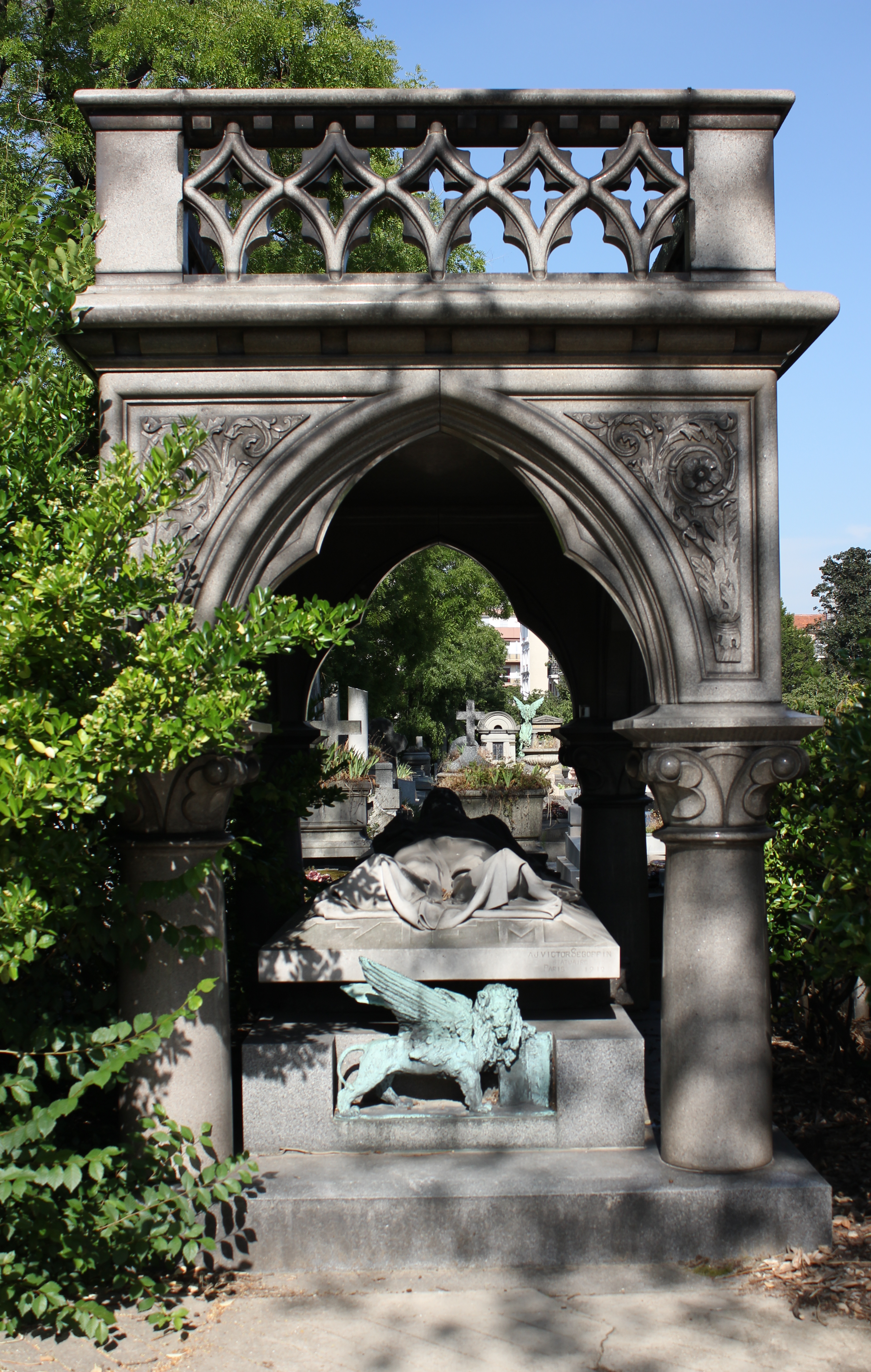 Sépulture de Félix Ziem (1821-1911), peintre français. Monument orné d'un gisant de Félix Ziem par Victor Segoffin.